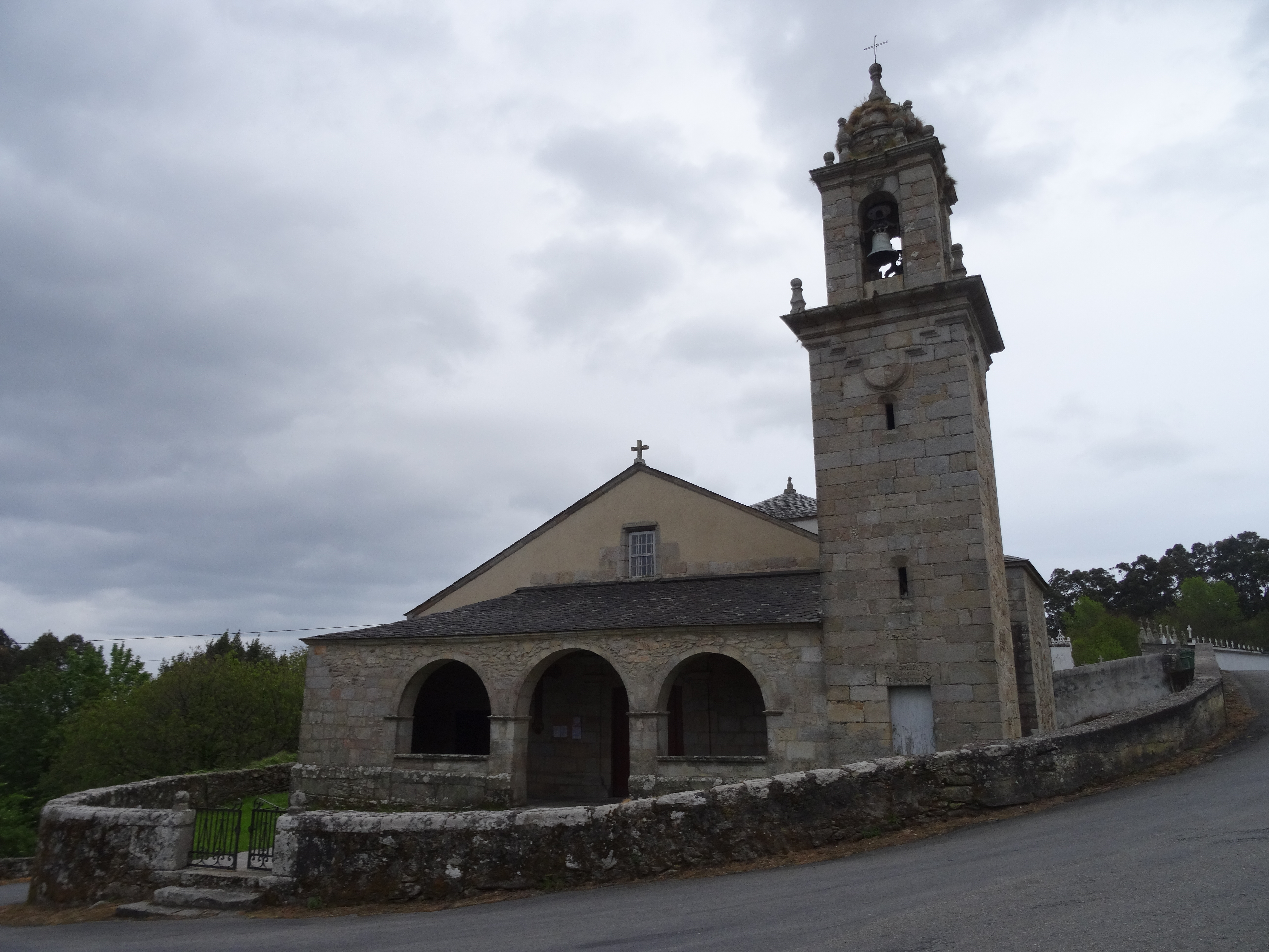 Ver título